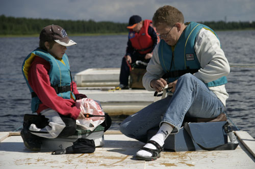 Kesäpilkin MM-kisat